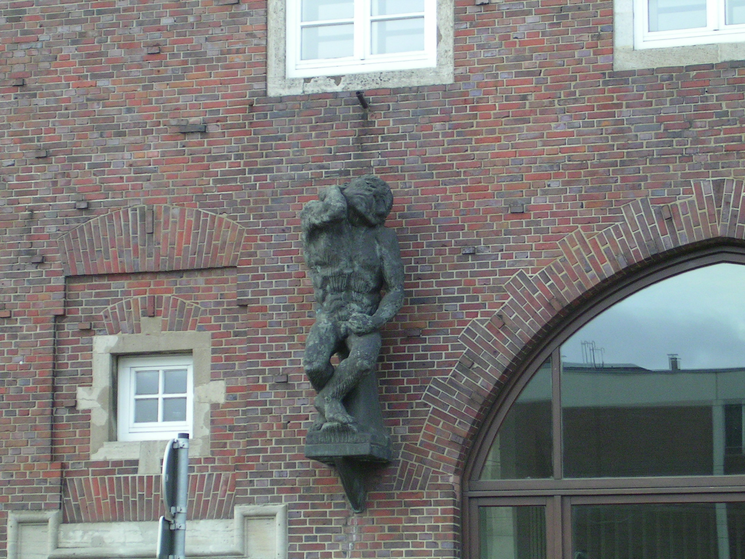 Template:Volkshaus, Bremen User:Tarawneh/rami